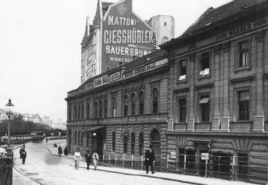 de: Das Portal des alten Dianabades 1912